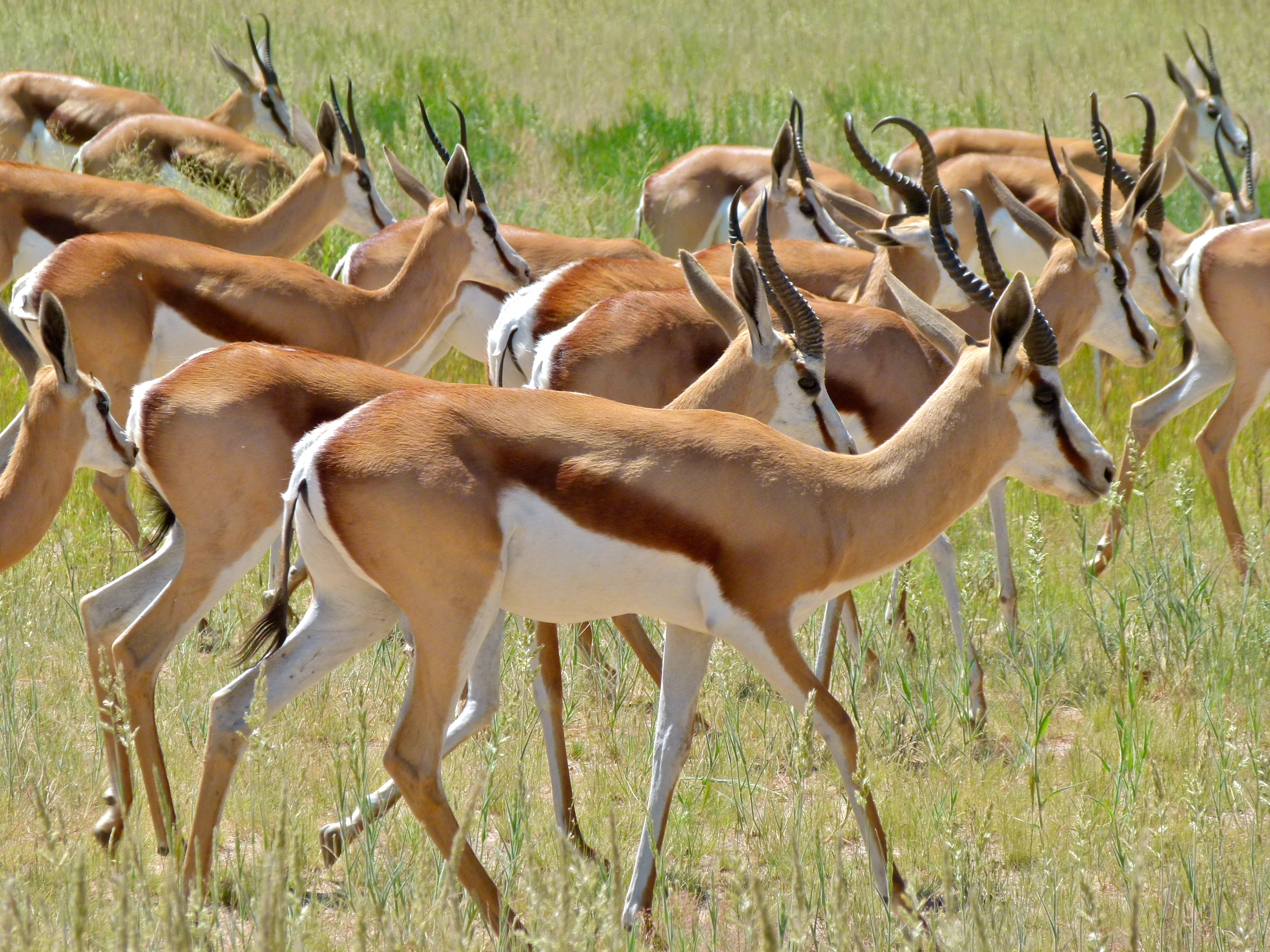 Auob Riverbed, Kgalagadi Transfrontier Park, SOUTH AFRICA